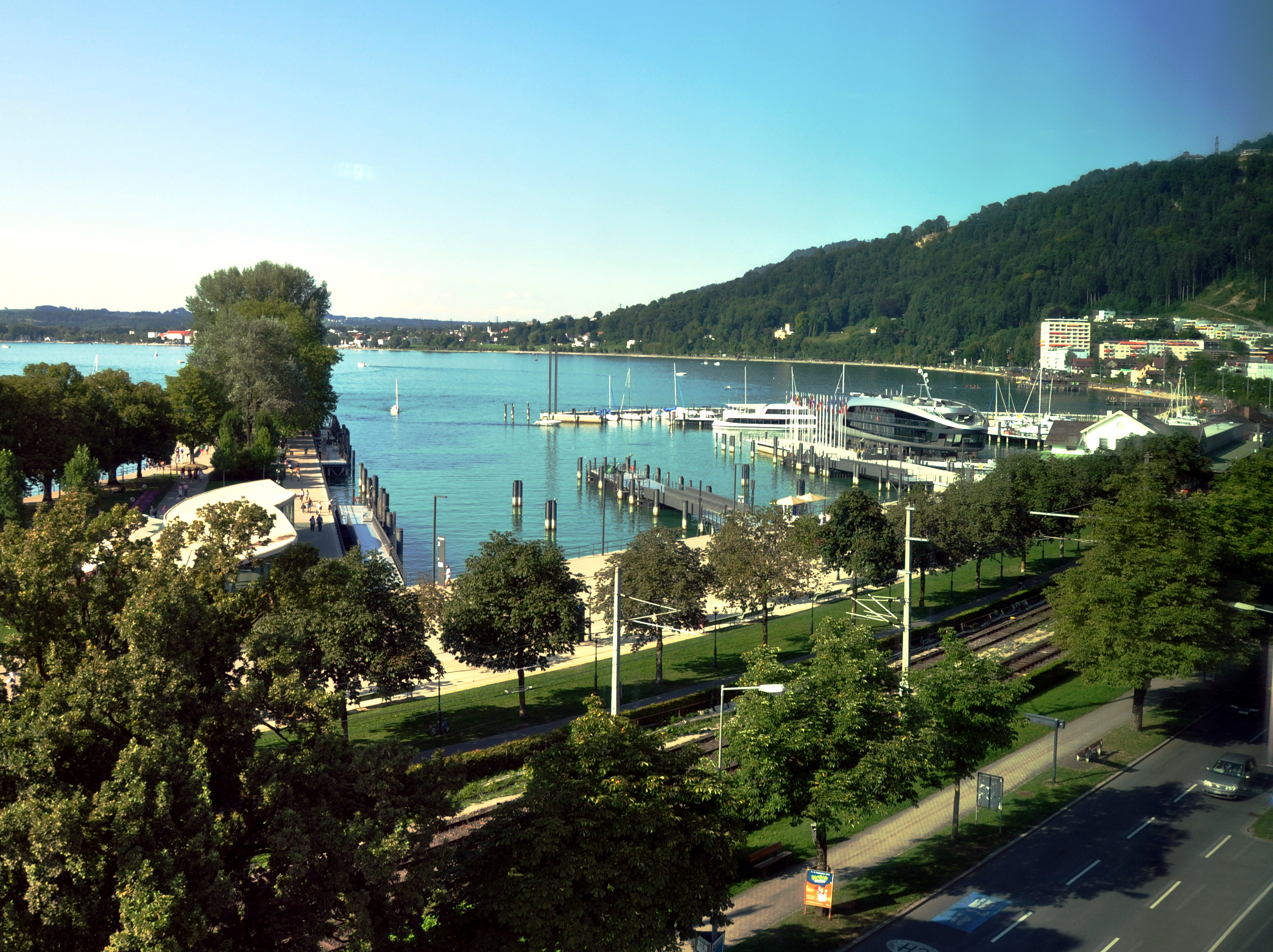 Bregenz, Blick aus dem Vorarlberg Museum auf den Hafen